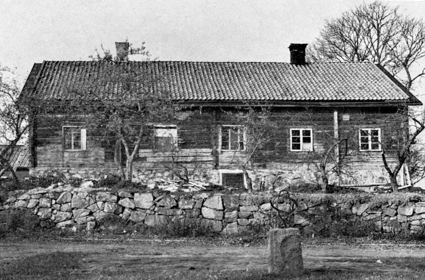 Värnbergs gamla huvudbyggnad (revs 1954-55)